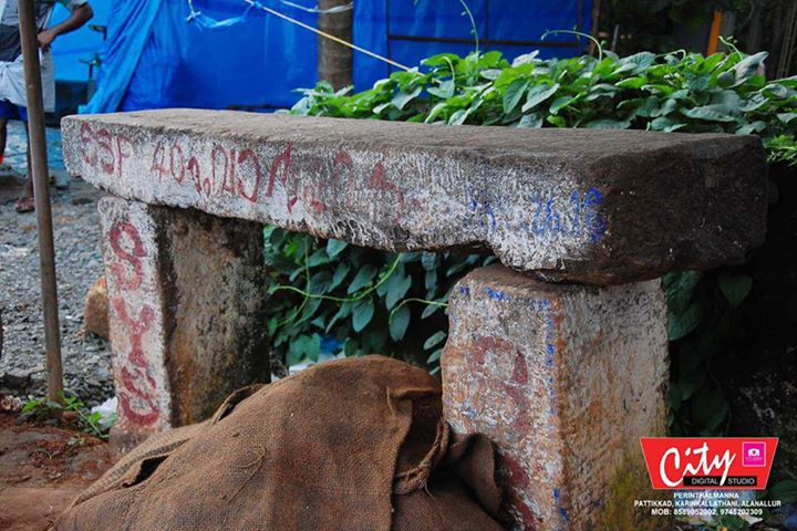 കരിങ്കല്ലത്താണിയിലെ അത്താണി.